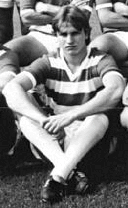 Title: Mannschaftsfoto HFC Chemie Factual corrections and alternative descriptions are encouraged separately from the original description. Additionally errors can be reported at this page to inform the Bundesarchiv. Original historic description: ADN-ZB-Lehmann-23.8.83-zin-Halle: Die Mannschaft des HFC Chemie für die Fußball-Oberligasaison 1983-84. Vorn v.l.n.r.: Jens Helling, Lutz Radtke, Torhüter Frank Jaenecke, Torhüter Michael Walther, Uwe Lorenz und Holger Krostitz. Mitte v.l.n.r.: Roland Wawrzyniak, Dieter Strozniak, Jens Henschel, Werner Peter, Frank Pastor und Lothar Kurbjuweit. Stehend v.l.n.r.: Klaus Urbanczyk, verantwortlicher Oberligatrainer, Nobert Schübbe, Gerald Wagner, Andreas Wagenhaus, Jürgen Schliebe, Manfred Fülle, Mannschaftskapitän Hartmut Meinert, Michael Rehschuh, Wolfgang Schmidt und Trainer Wolfgang Kleinschmager.